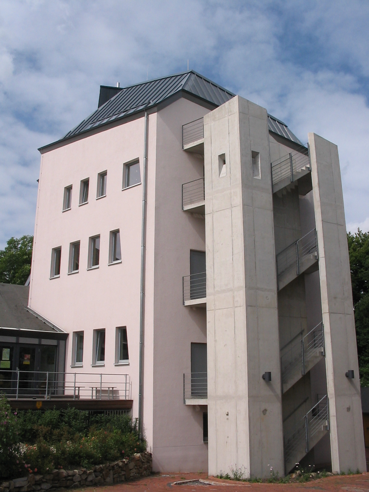 Institut für Waldorf-Pädagogik, Witten-Annen: Turm